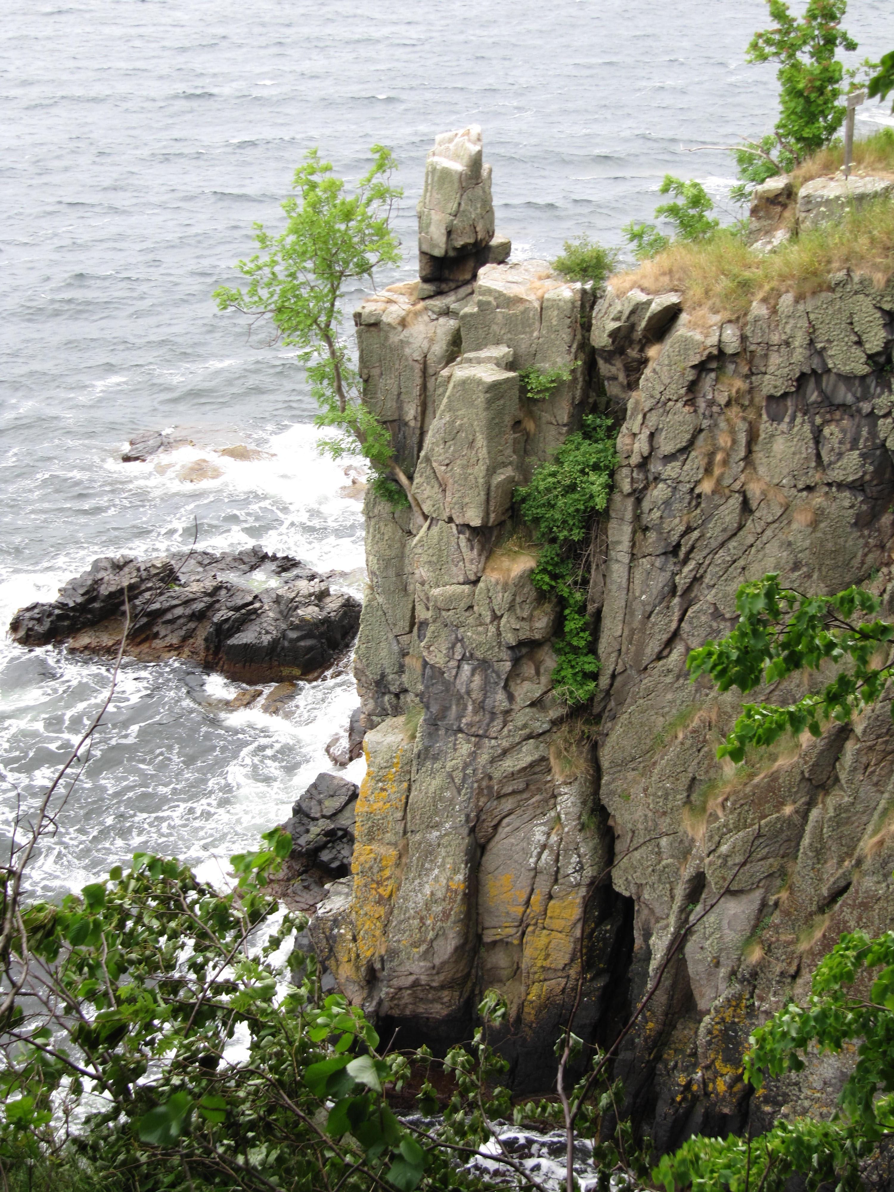 Helligdomsklipperne nordvest for Gudhjem.